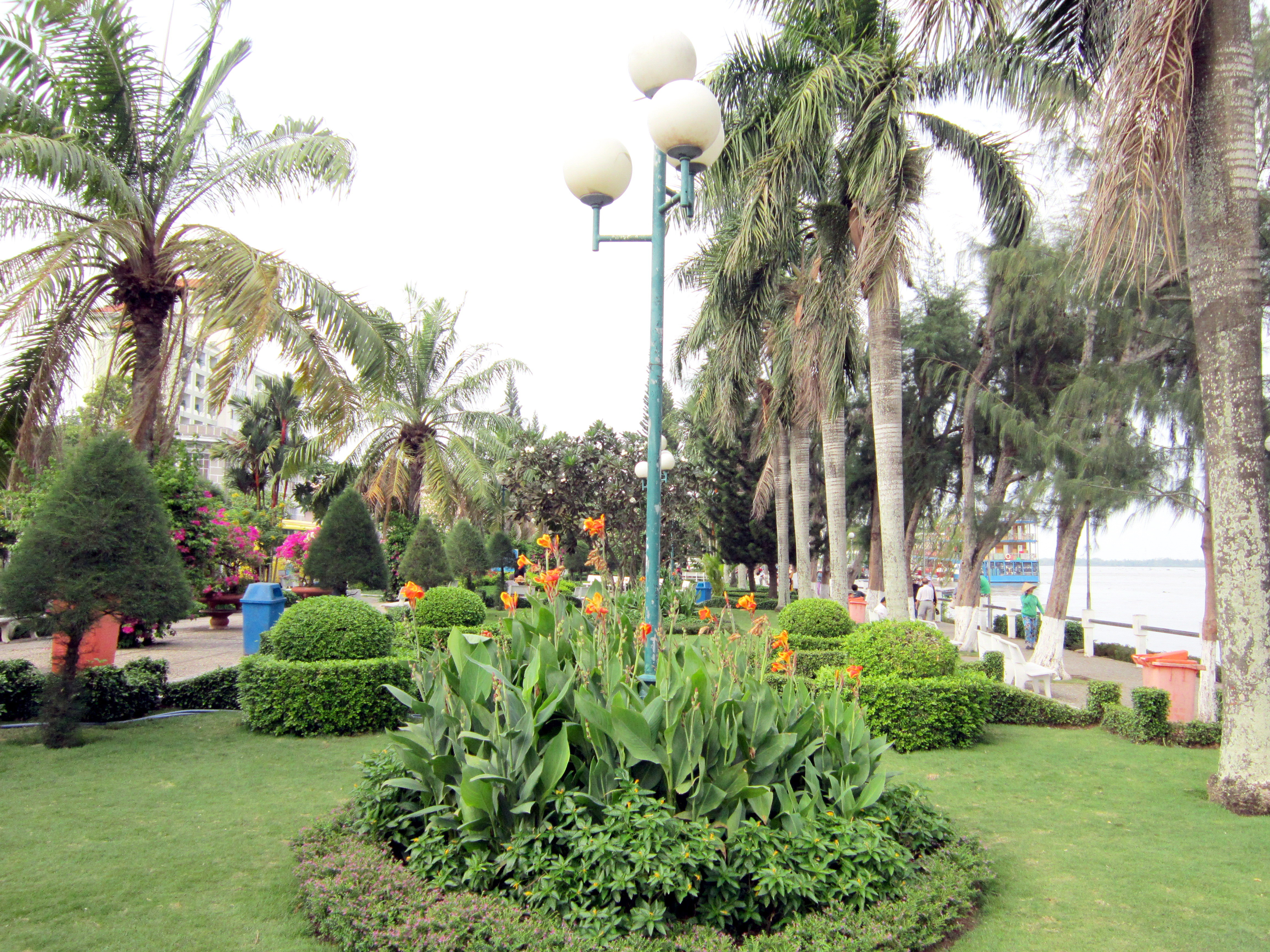 Công viên Ninh Kiều bên sông Cần Thơ (TP. Cần Thơ, Việt Nam)